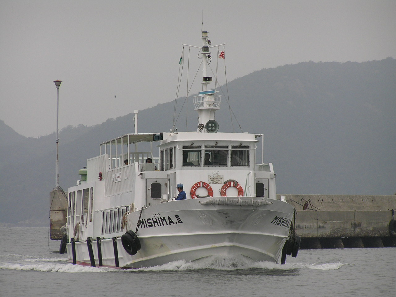 Taiseikisen 大生汽船 みしまⅢ Kashira island in Bizen, Okayama,Japan 岡山県備前市日生町日生,頭島港